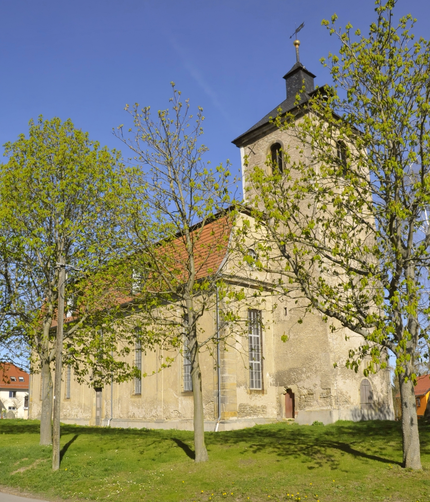 Töttelstädt, St.-Nicolai-Kirche